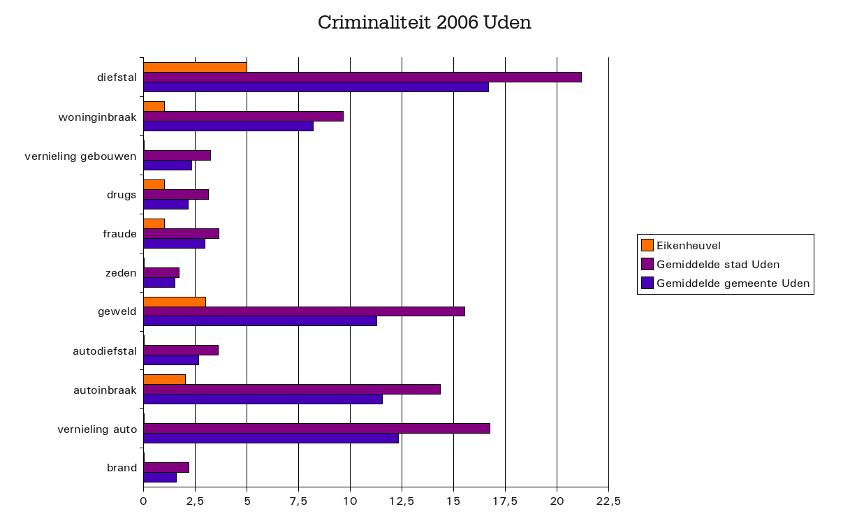 Criminaliteitcijfers in Uden Eikenheuvel (2006), Noord-Brabant, The Netherlands